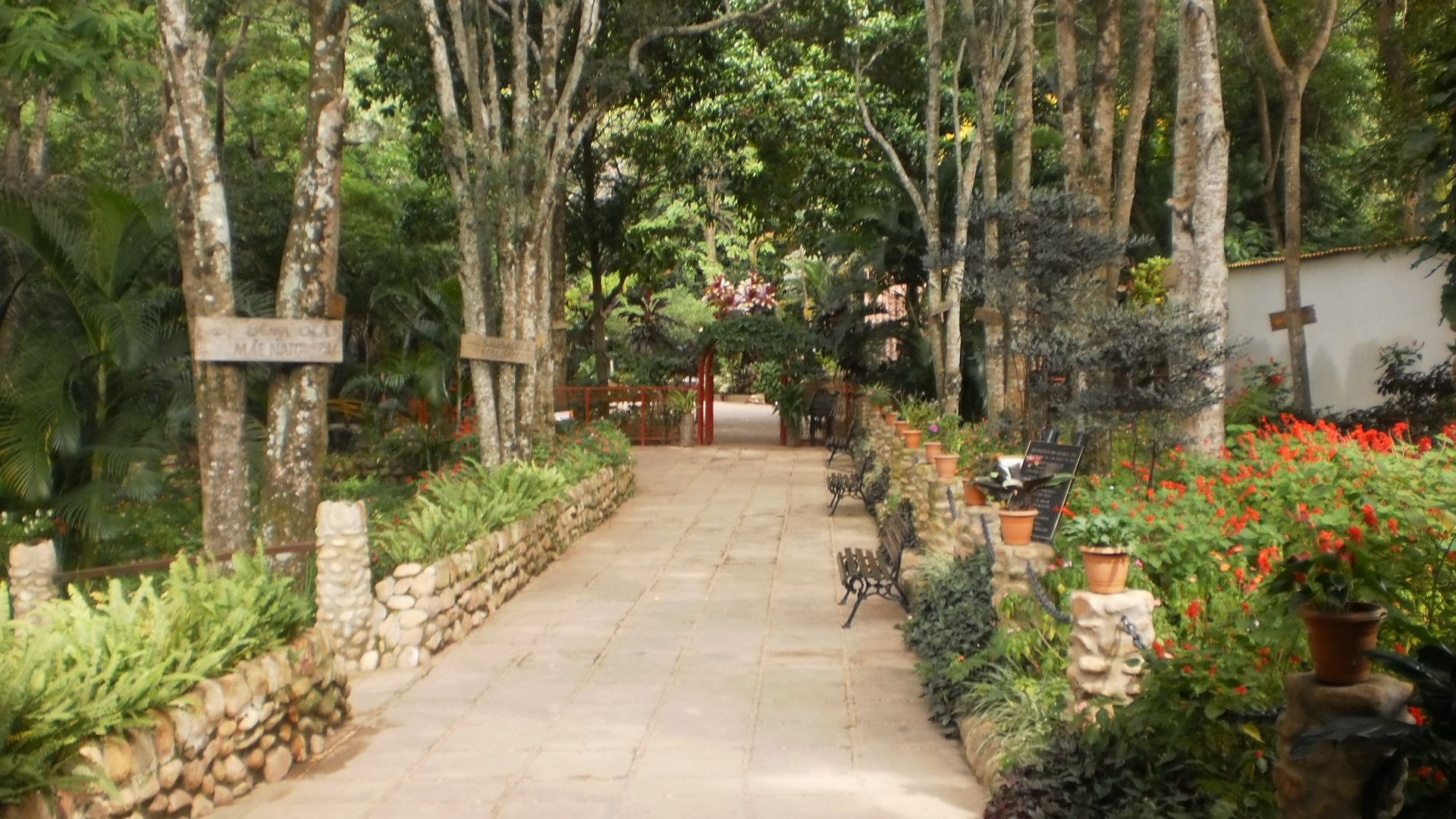 Alameda de entrada do Balneário do Caldas - Barbalha - Ce.